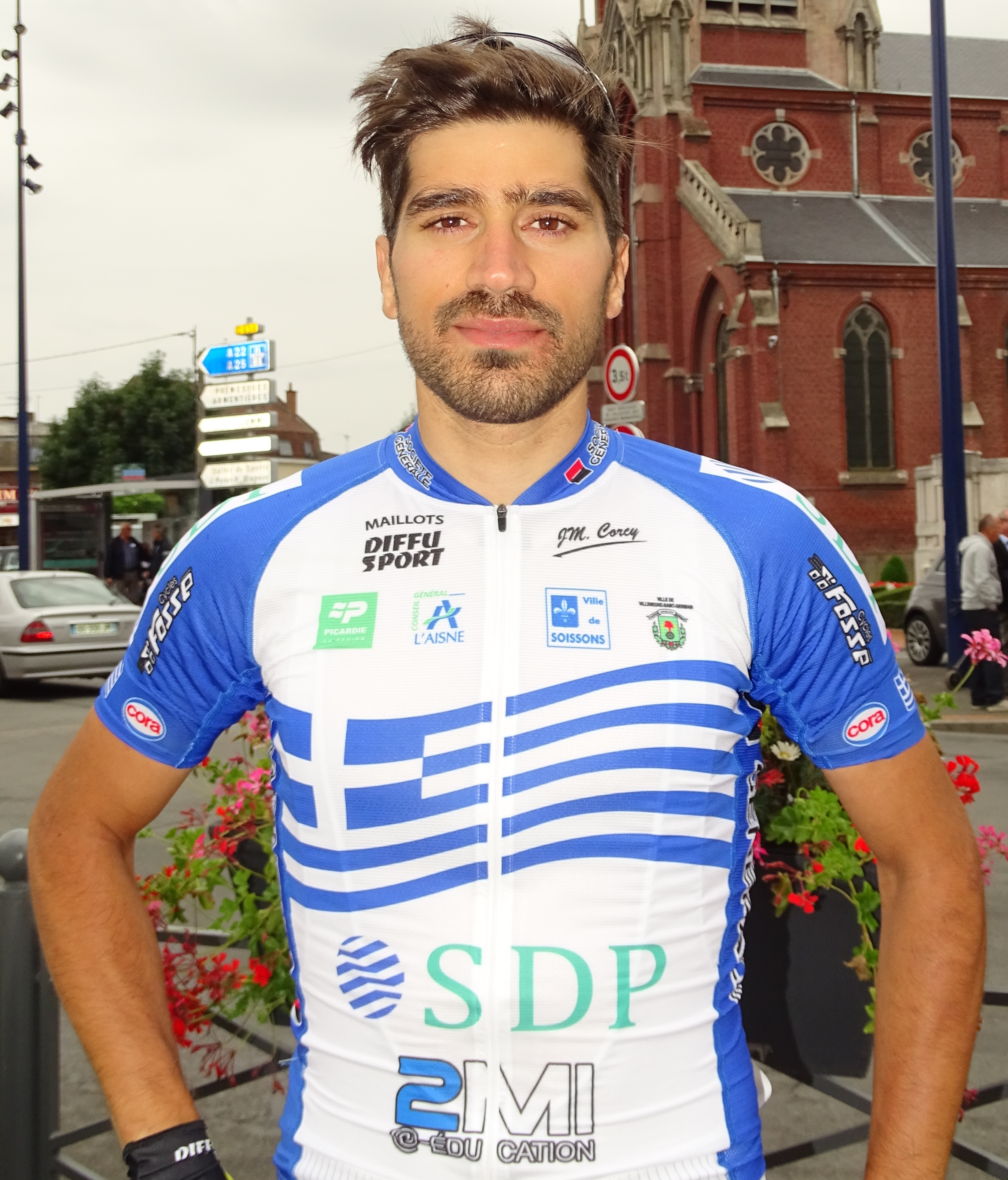 Reportage réalisé le dimanche 26 juillet à l'occasion du départ et de l'arrivée du Grand Prix de la ville de Pérenchies 2015 à Pérenchies, Nord, Nord-Pas-de-Calais, France.